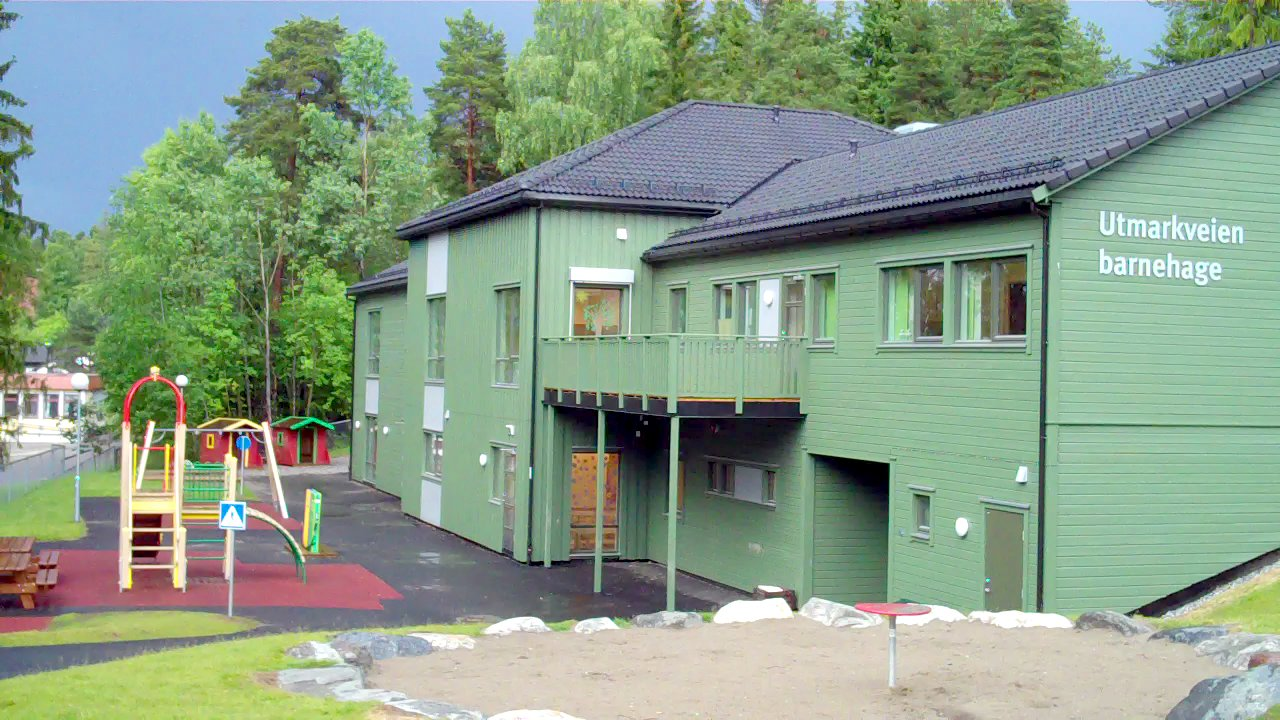 Utmarkveien barnehage, Bøler i Oslo.